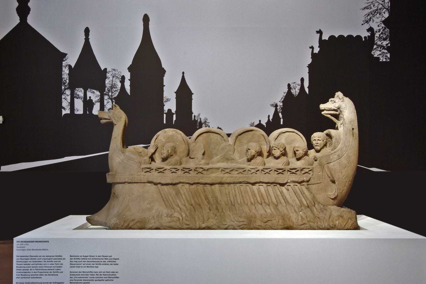 „Weinschiff“ als Aufsatz eines Grabdenkmals. Anfang 3. Jh. n. Chr.